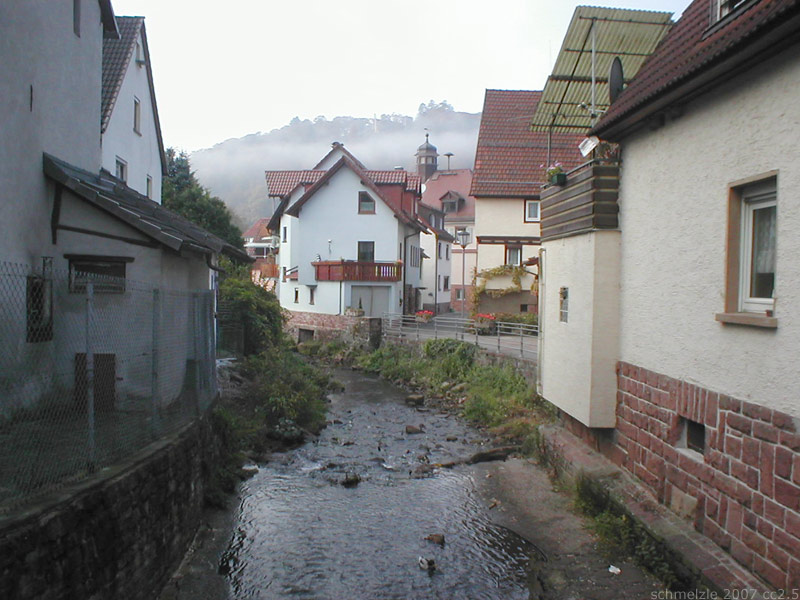 Seebach in Neckargerach, Baden-Württemberg, Deutschland